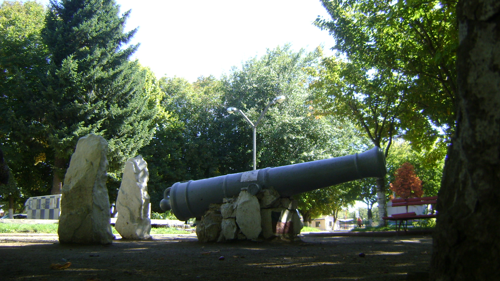 Cañon del fuerte de Negrete, en plaza armas de Negrete, trasladado desde cerro Mariman donde existia un torreon que servia de atalaya